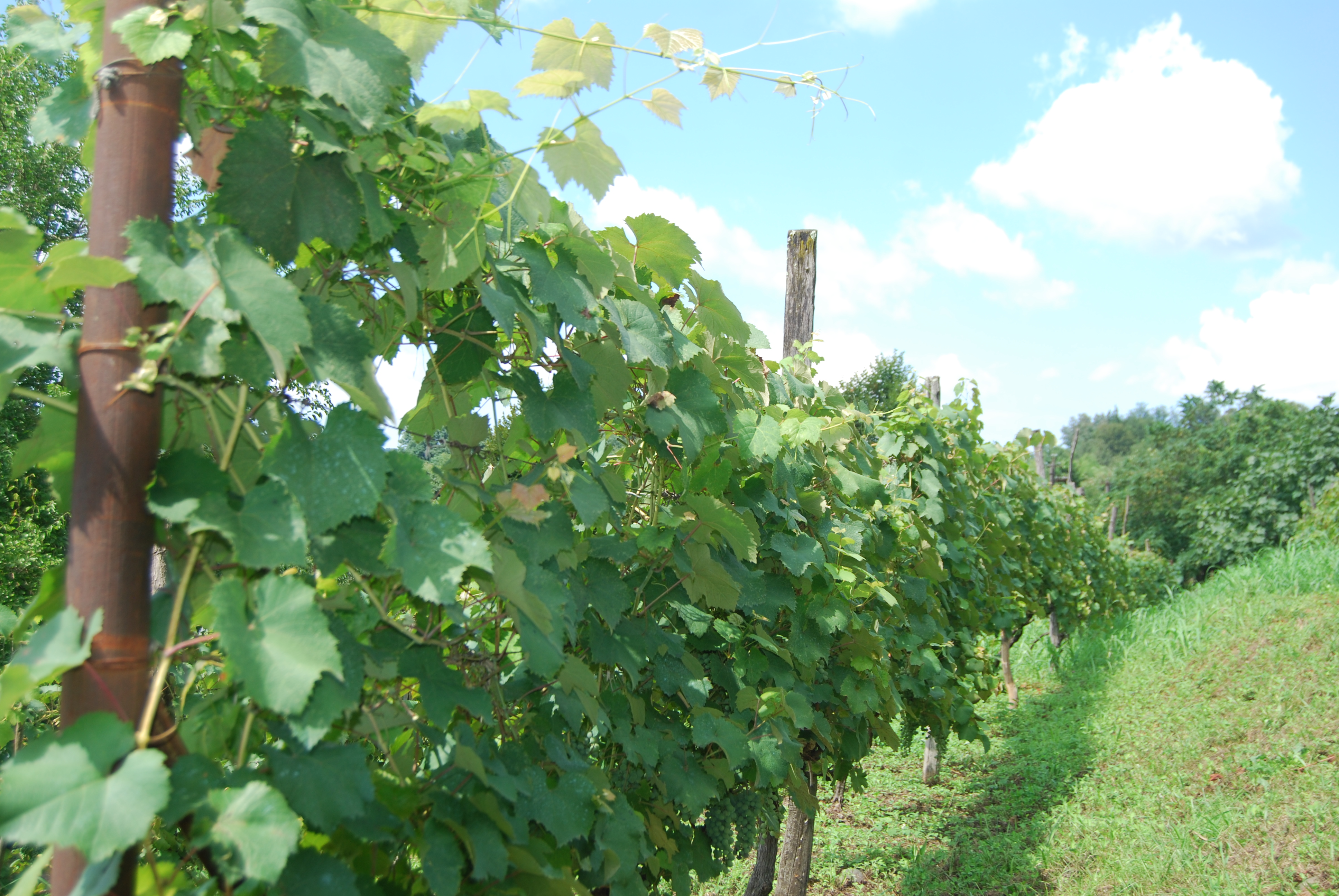 ჩხავრის ვენახები, კომპანია „იბერიელი“, სოფელი საყვავისტყე